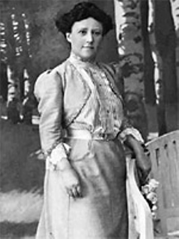 Гермина Хуг-Хельмут, австрийский психоаналитик